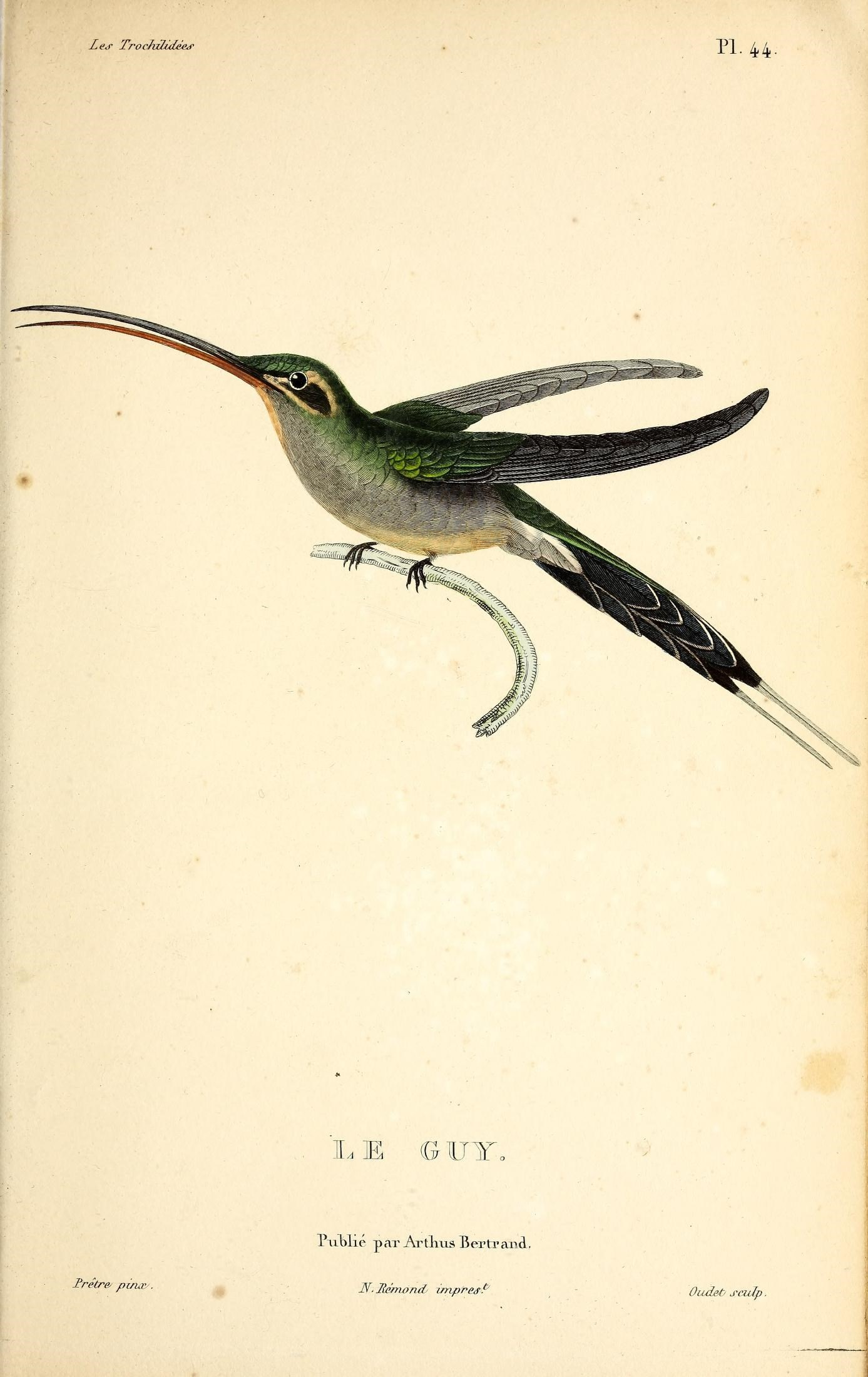 Les trochilidées :. Paris :A. Bertrand,[1832?].